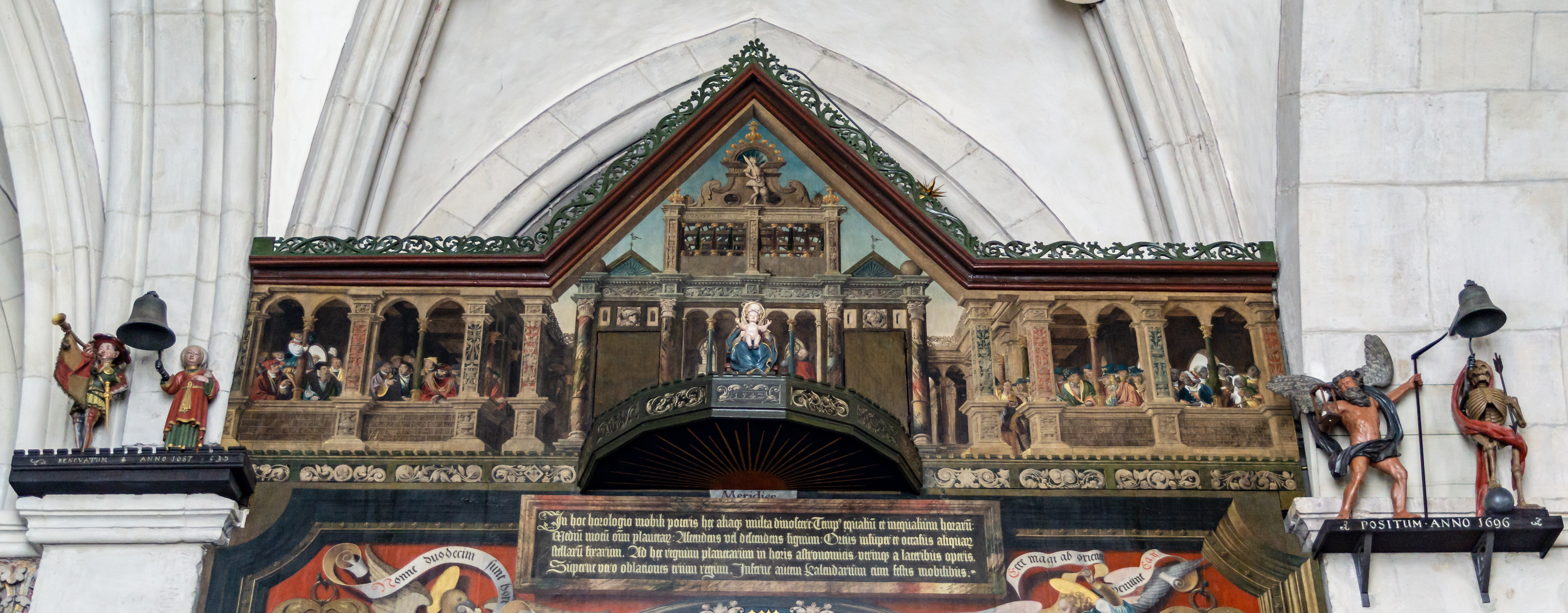 St.-Paulus-Dom_(Münster): Astronomische Uhr